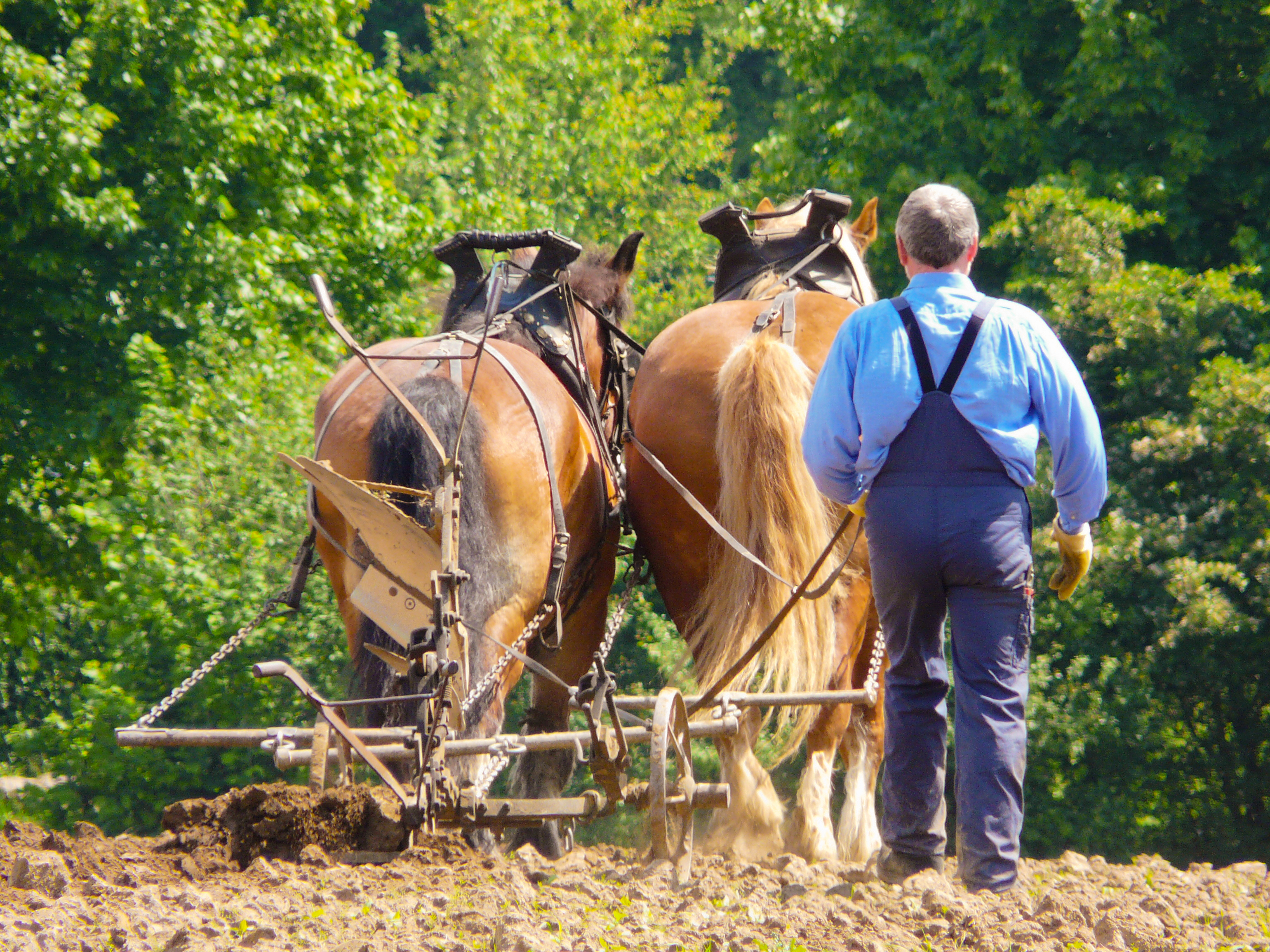 Demonstration des Pflügens mit Pferden im LVR Freilichtmuseum Lindlar, NRW